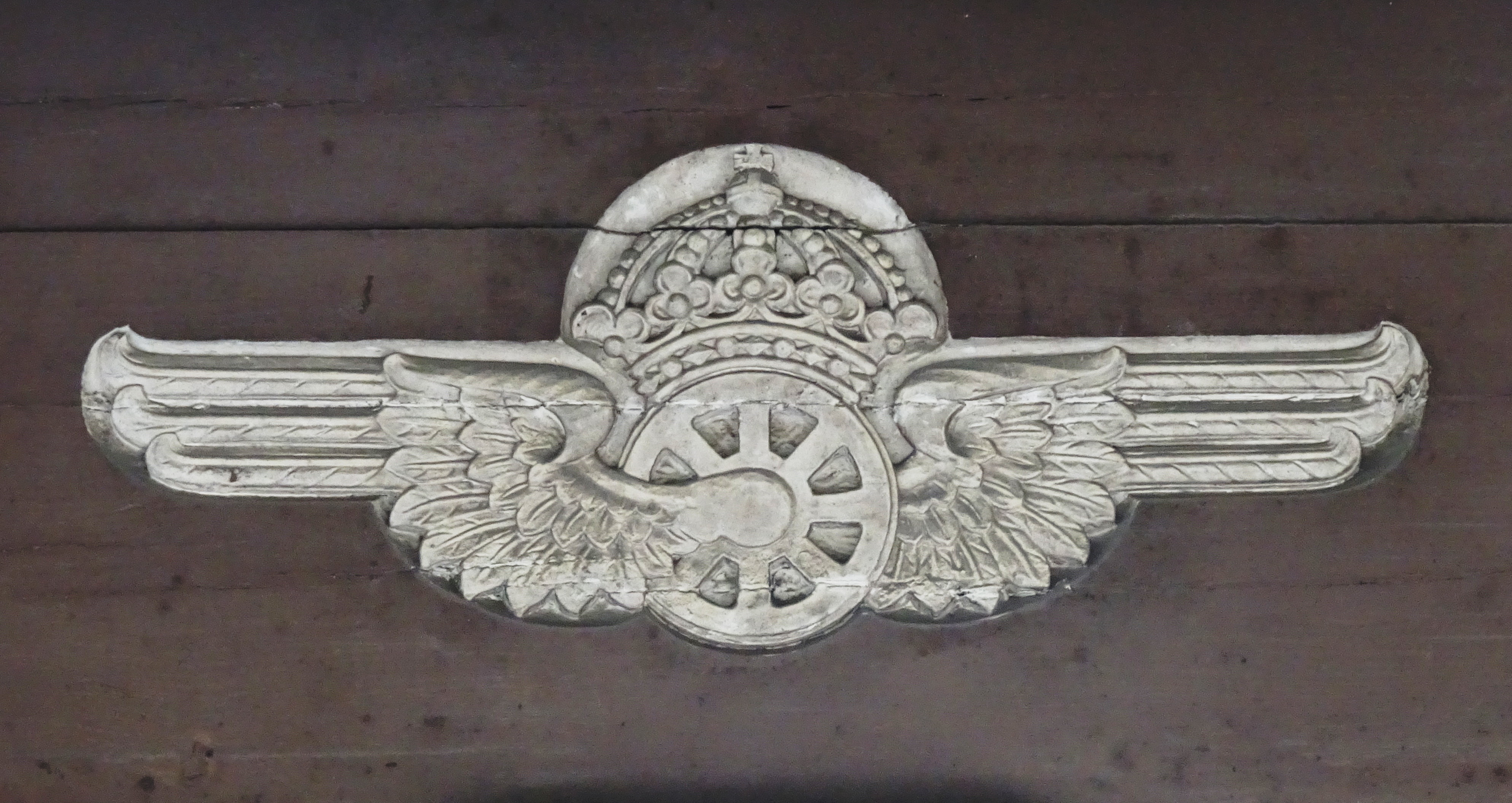 Södertälje stationshus byggt 1916-1918 efterritningar av arkitekt Folke Zettervall